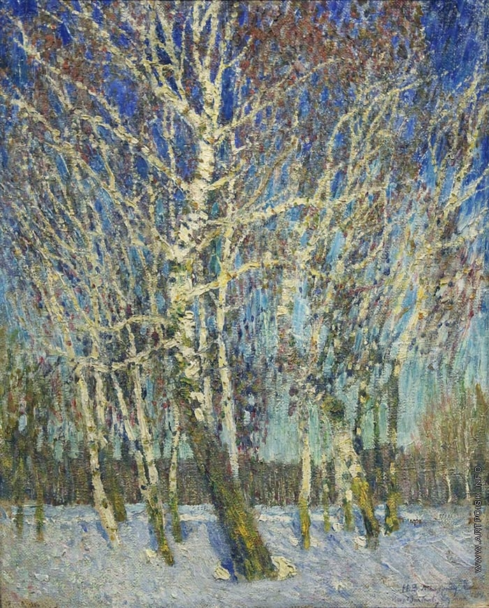 Февральская лазурь Год создания 1904 Материал Холст, масло Собрание Национальный художественный музей Республики Беларусь